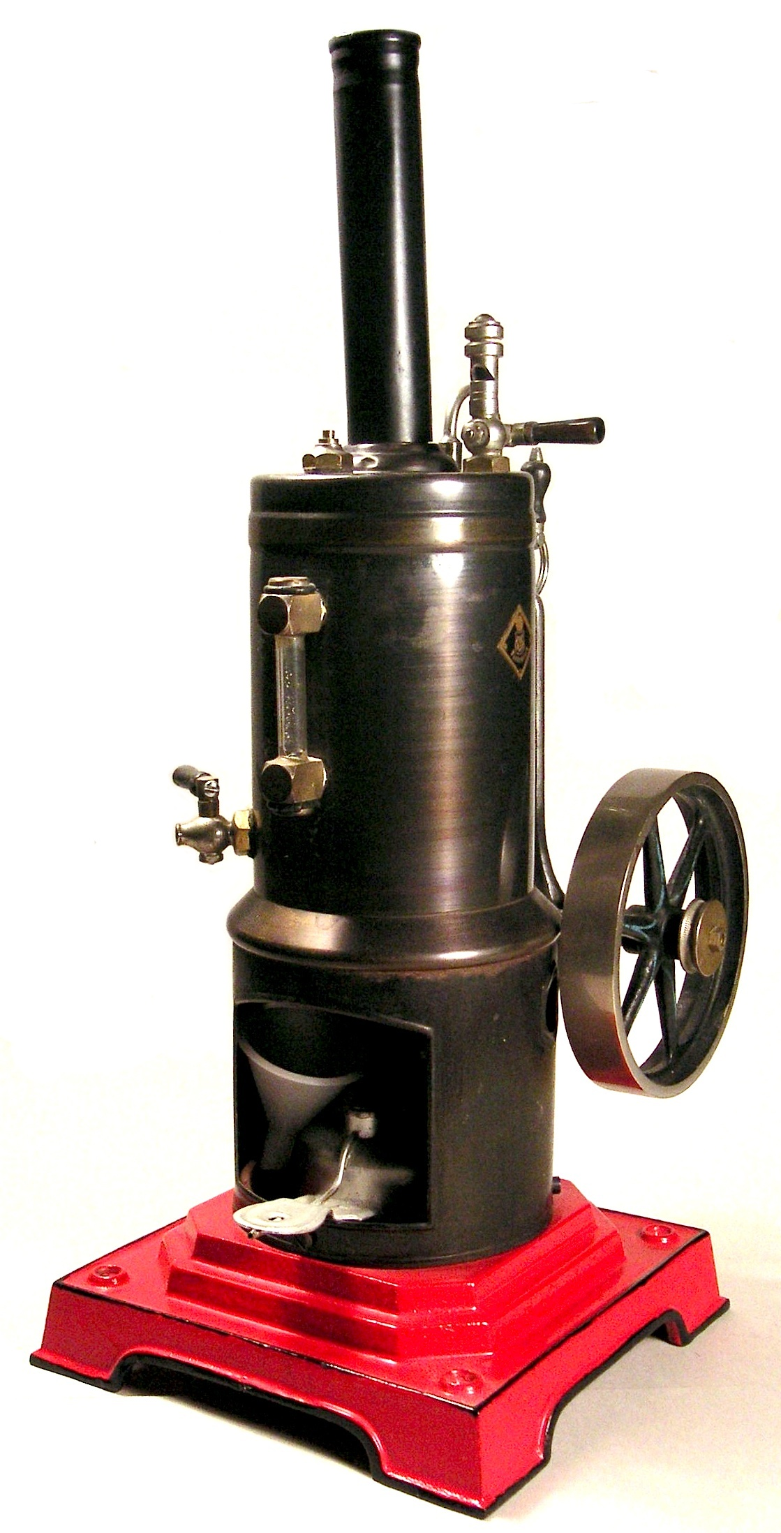 Märklin steam engine, ca. 1915